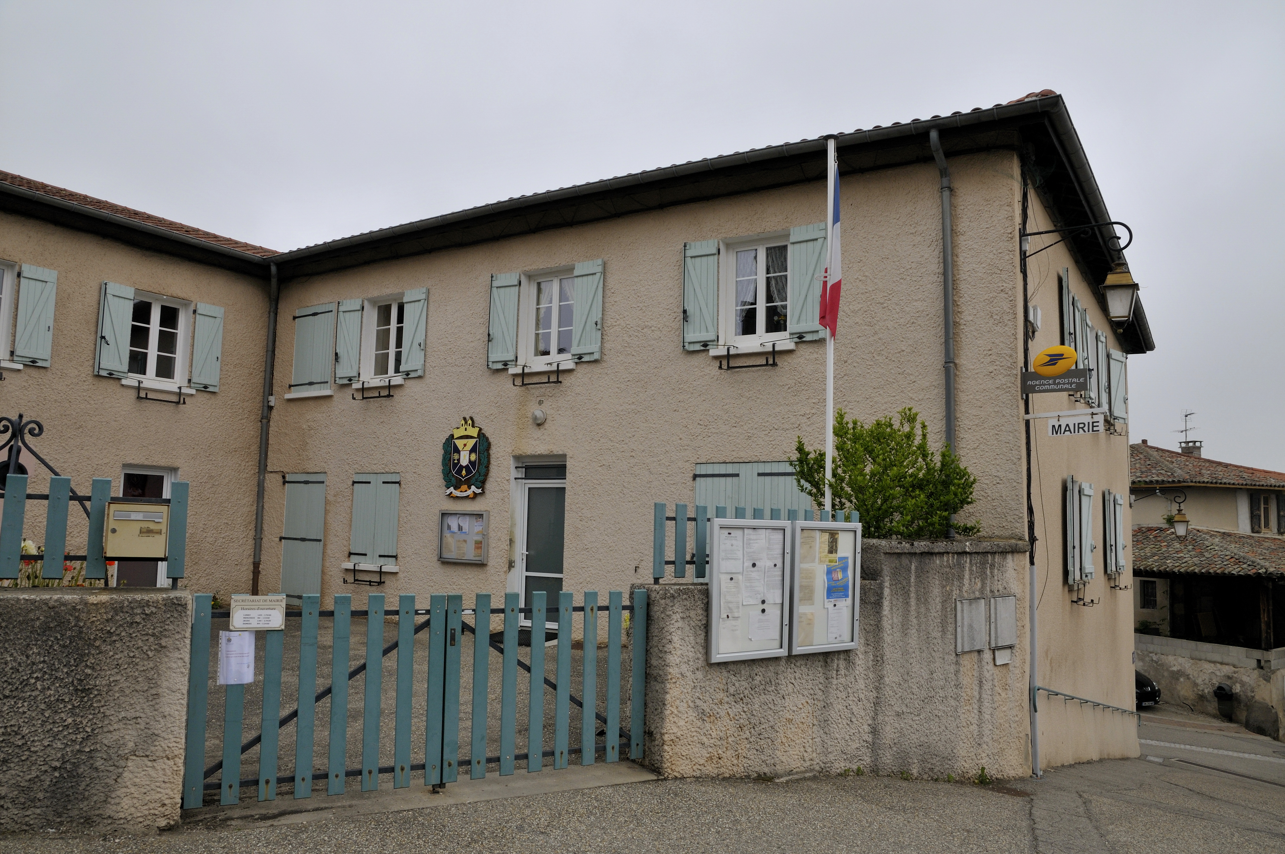 mairie